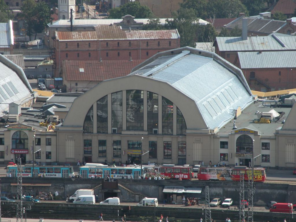 Riga, Lettland, Markthallen (Detail)